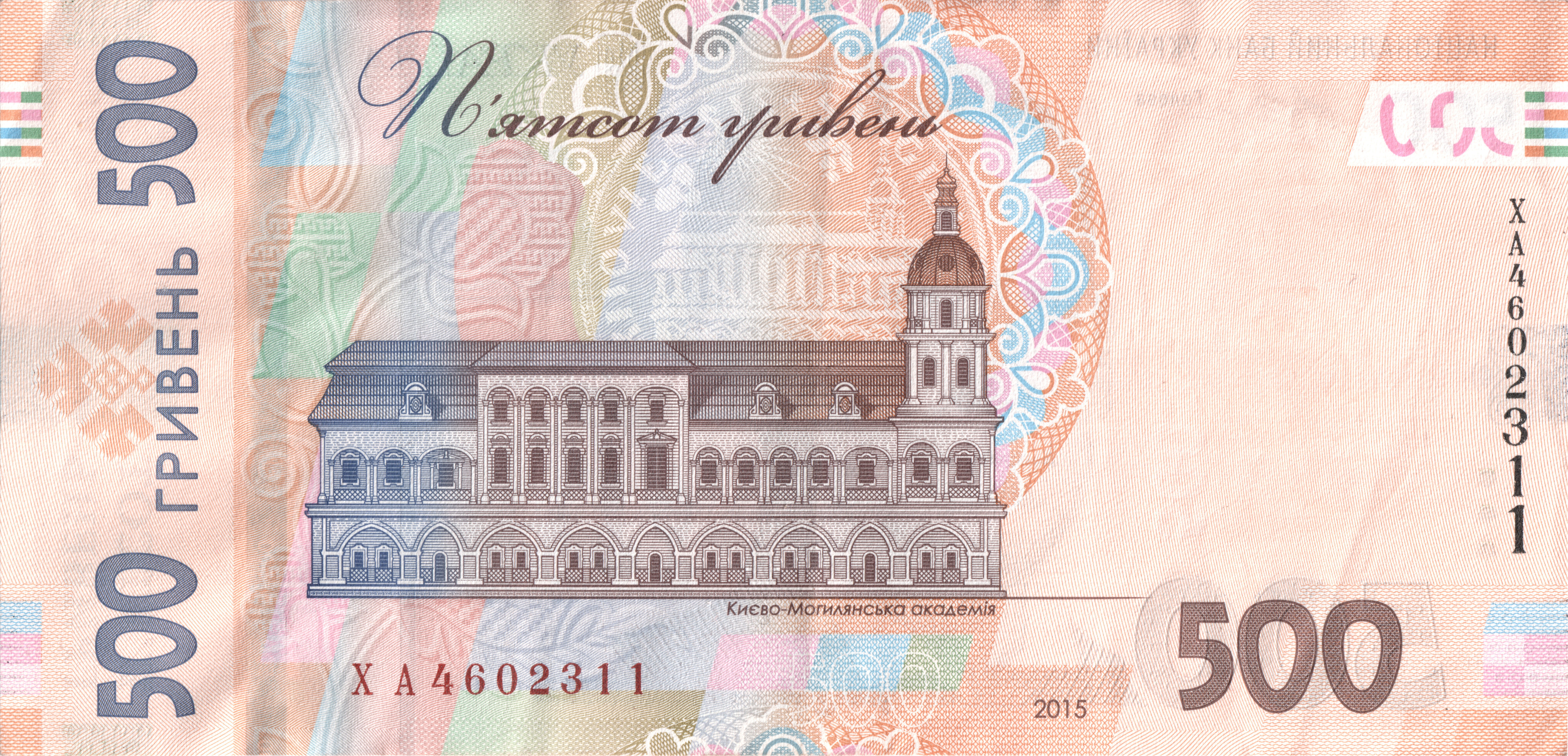 500 гривень 2015 року (новий зразок) реверс